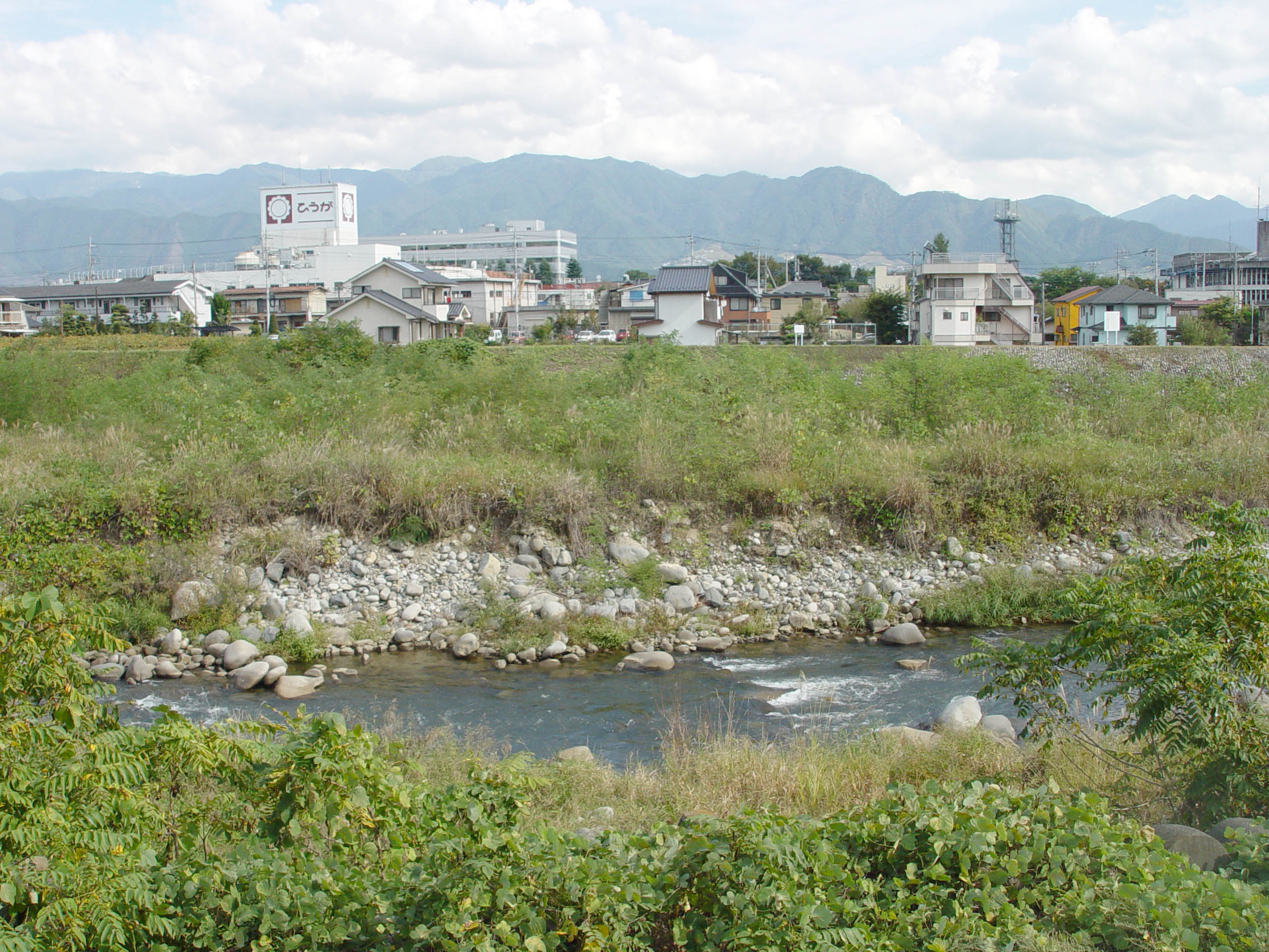 Yamanashi City Center from Fuefuki River, Yamanashi, Yamanashi, Japan笛吹川から山梨市